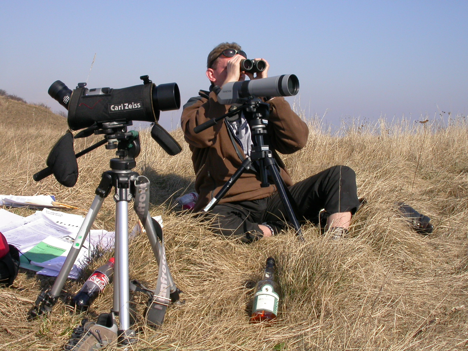 Fuglekigning på Molslaboratoriets område